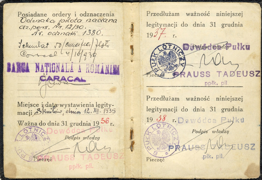 Legitymacja osobista Mieczysława Halickiego 2